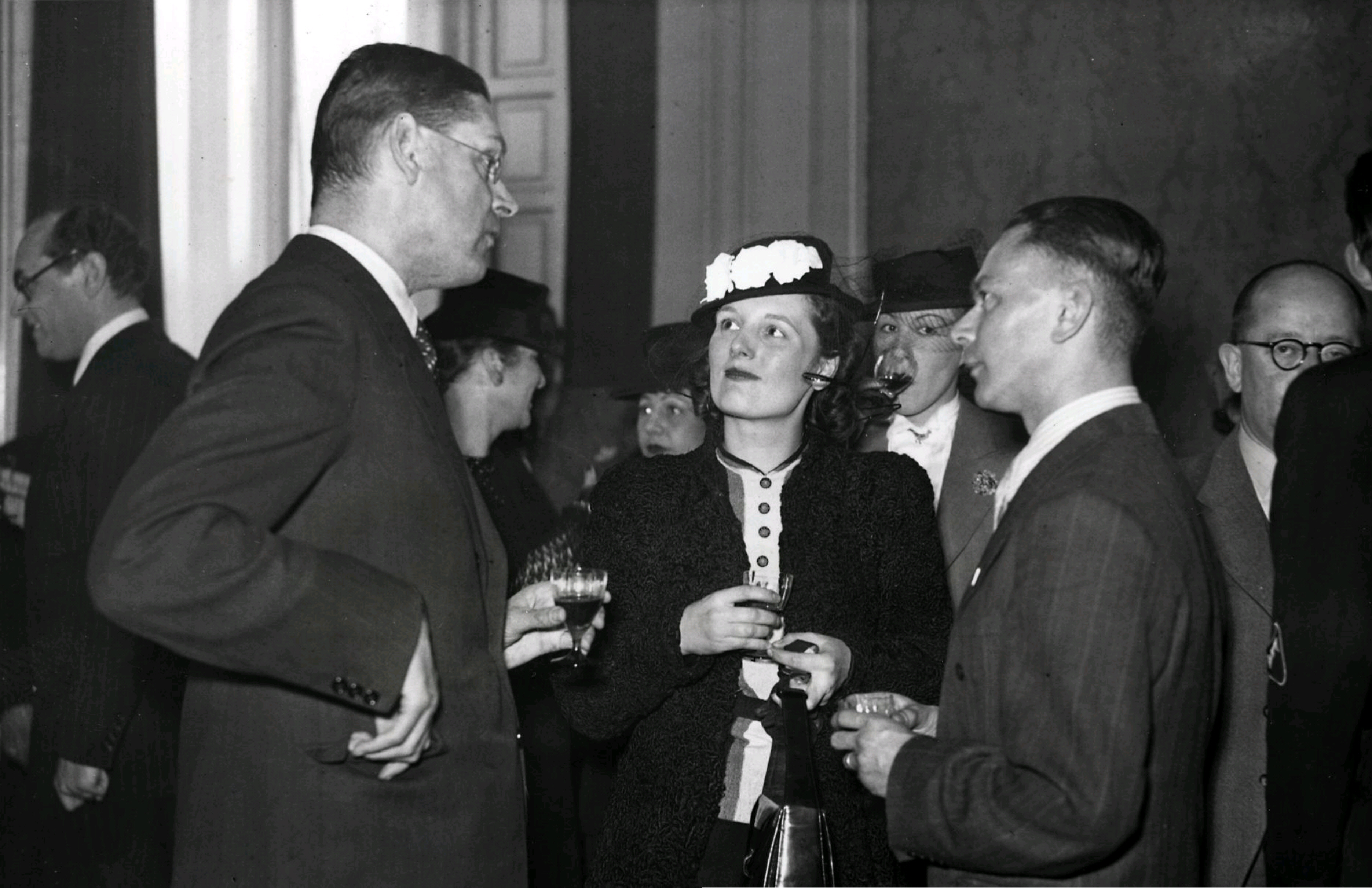 "De (NSB)- Secretaris-Generaal van het departement van Volksvoorlichting en Kunsten, Dr. Tobie Goedewaagen heeft hedenmiddag op het departement een groot aantal acteurs en actrices ontvangen, Den Haag, Nederland 26 maart 1941". Foto: Geheel links Johan de Meester, Dr. Th. Goedewaagen, Ank van der Moer, Josephine van Gasteren (neemt net een slokje) en Adriaan van Hees.